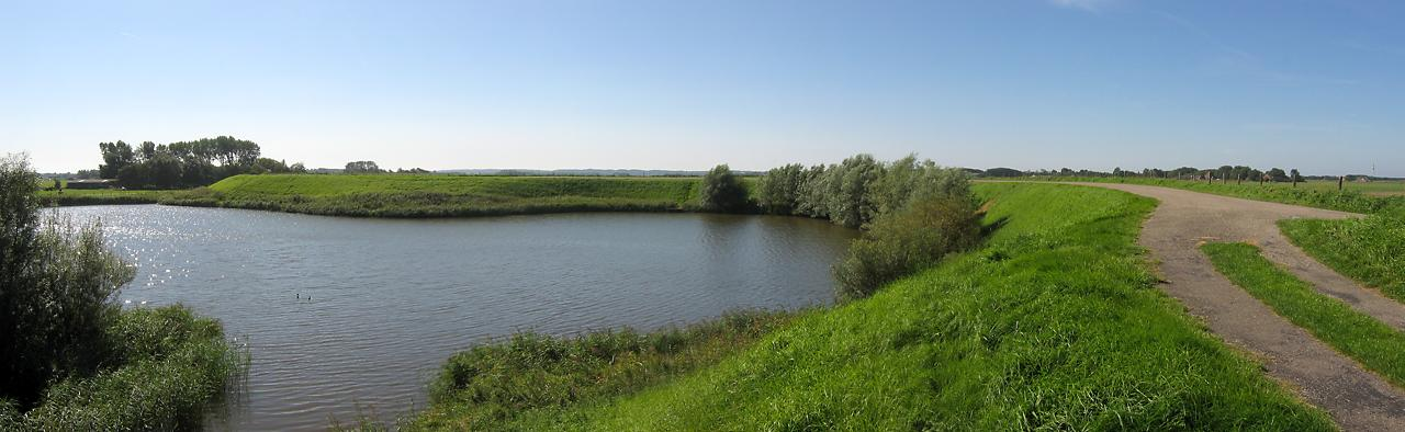 Wiel langs de West-Friese zeedijk in de buurt van Sint Maarten